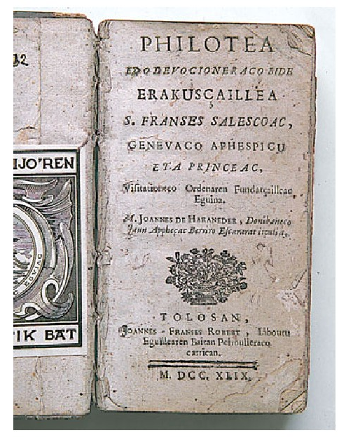 Joannes Haranederren Philotea, edo devocioneraco bide erakusçaillea-ren lehenbiziko edizioaren azala (Tolosa, 1749) (KOLDO MITXELENA Kulturunea).